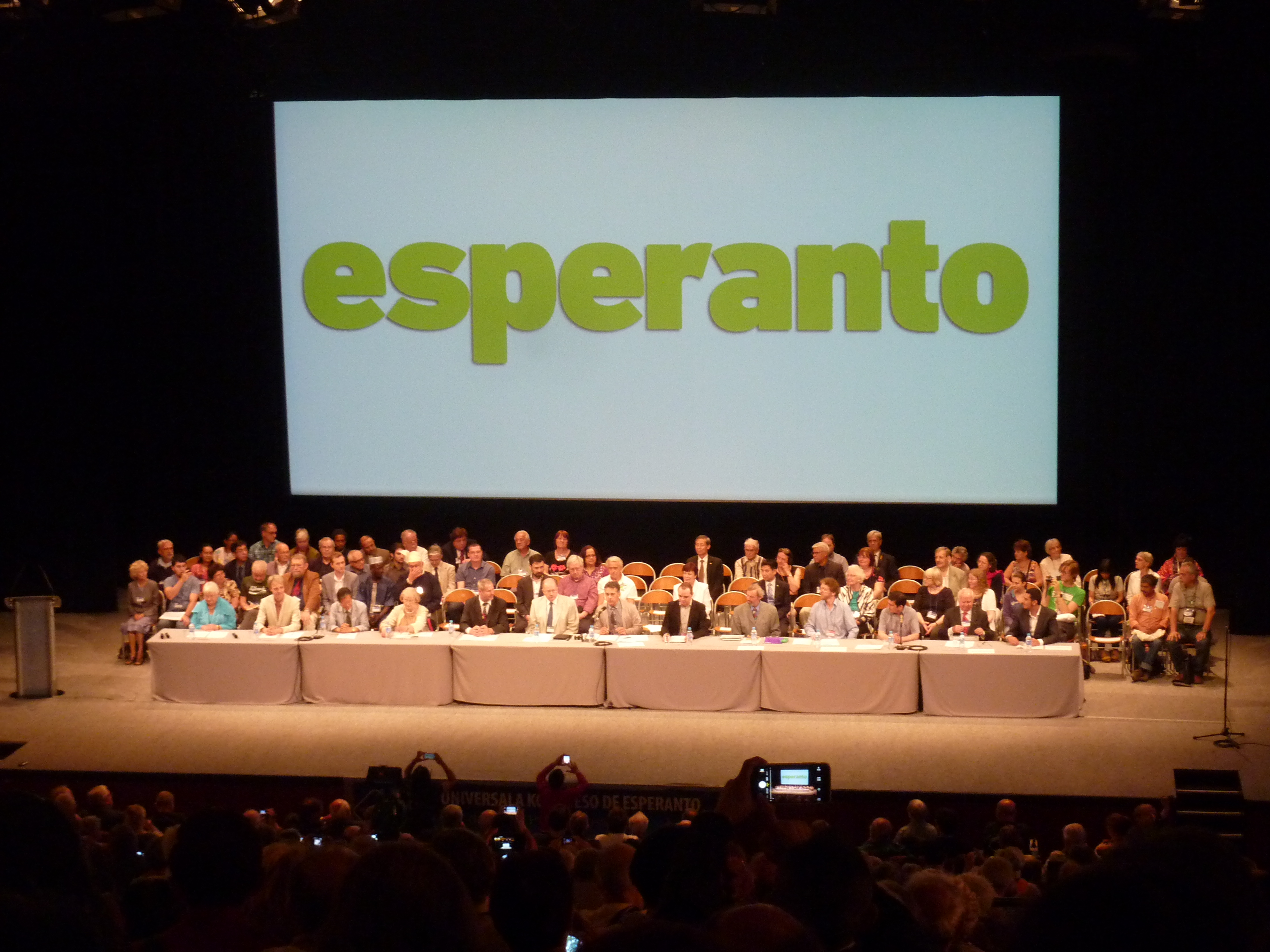 Solena malfermo de la 100-a Universala Kongreso de Esperanto en Lille (Francio)